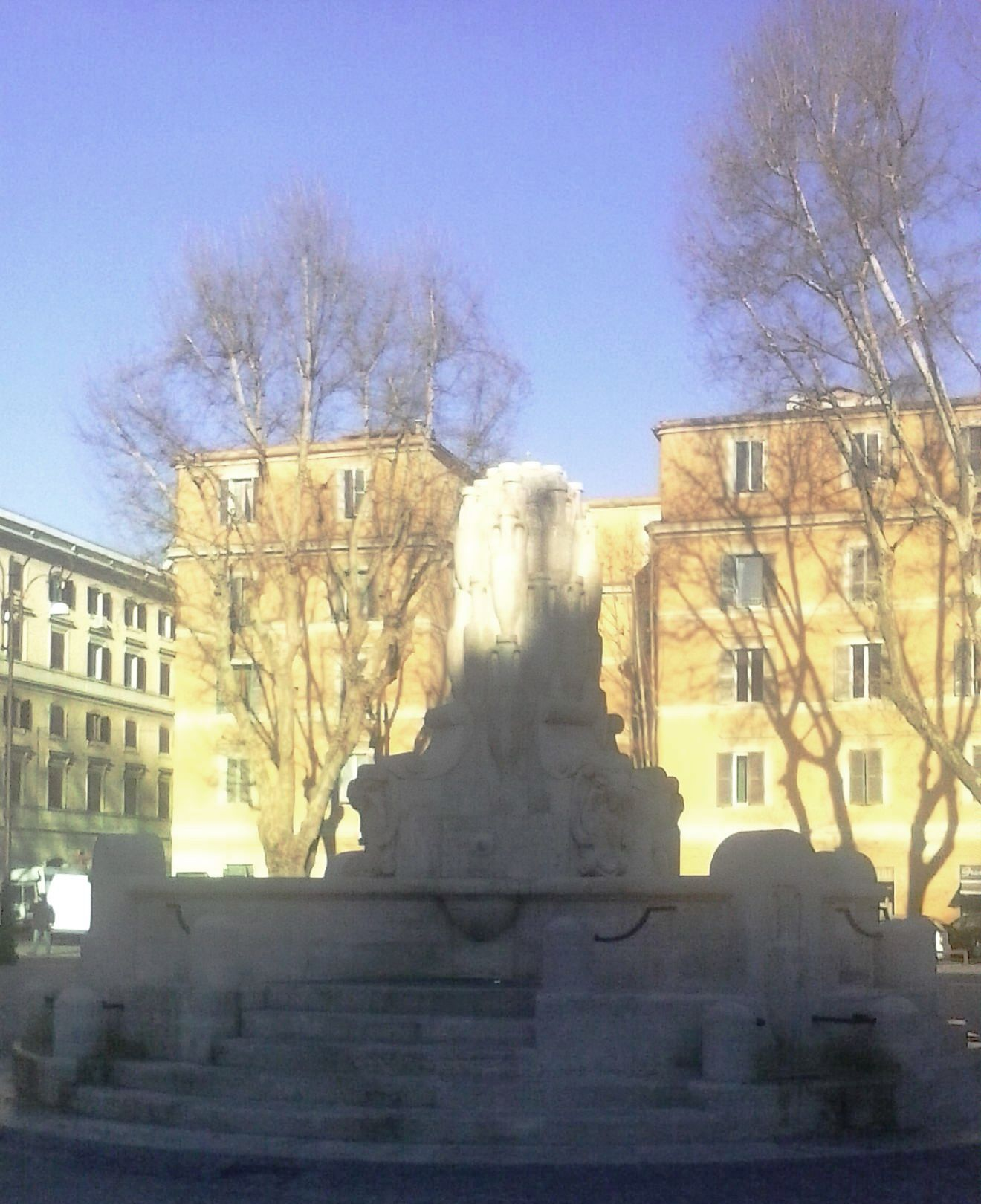 La fontana delle Anfore ricollocata nella sua sede originaria, in Piazza Testaccio a Roma